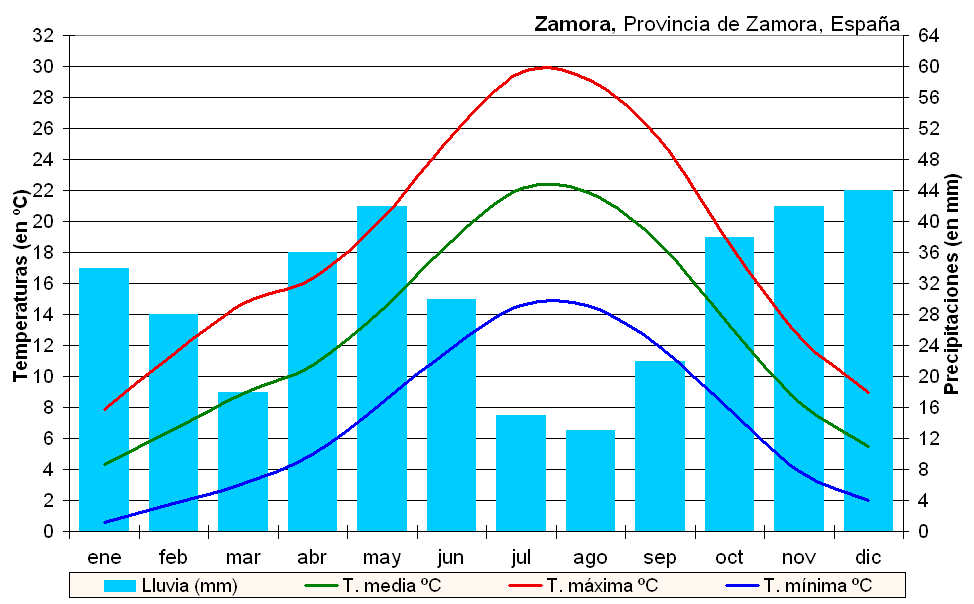 Clima de Zamora, España.